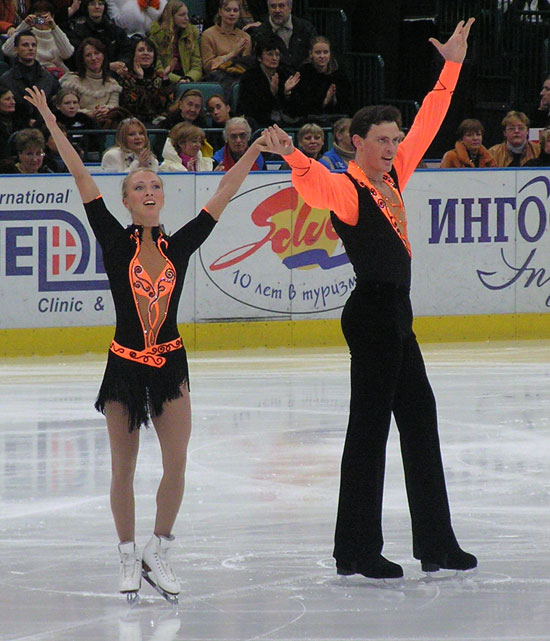 Tatiana Totmianina und Maxim Marinin während der Russischen Meisterschaften 2005